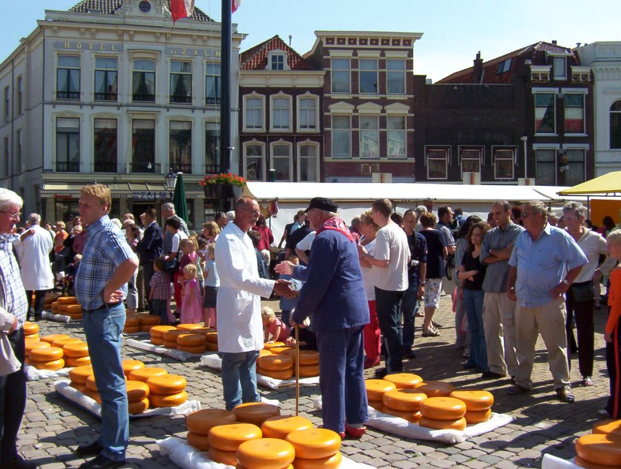 Goudse kaasmarkt juli 2004, eigen foto gebruik vrij